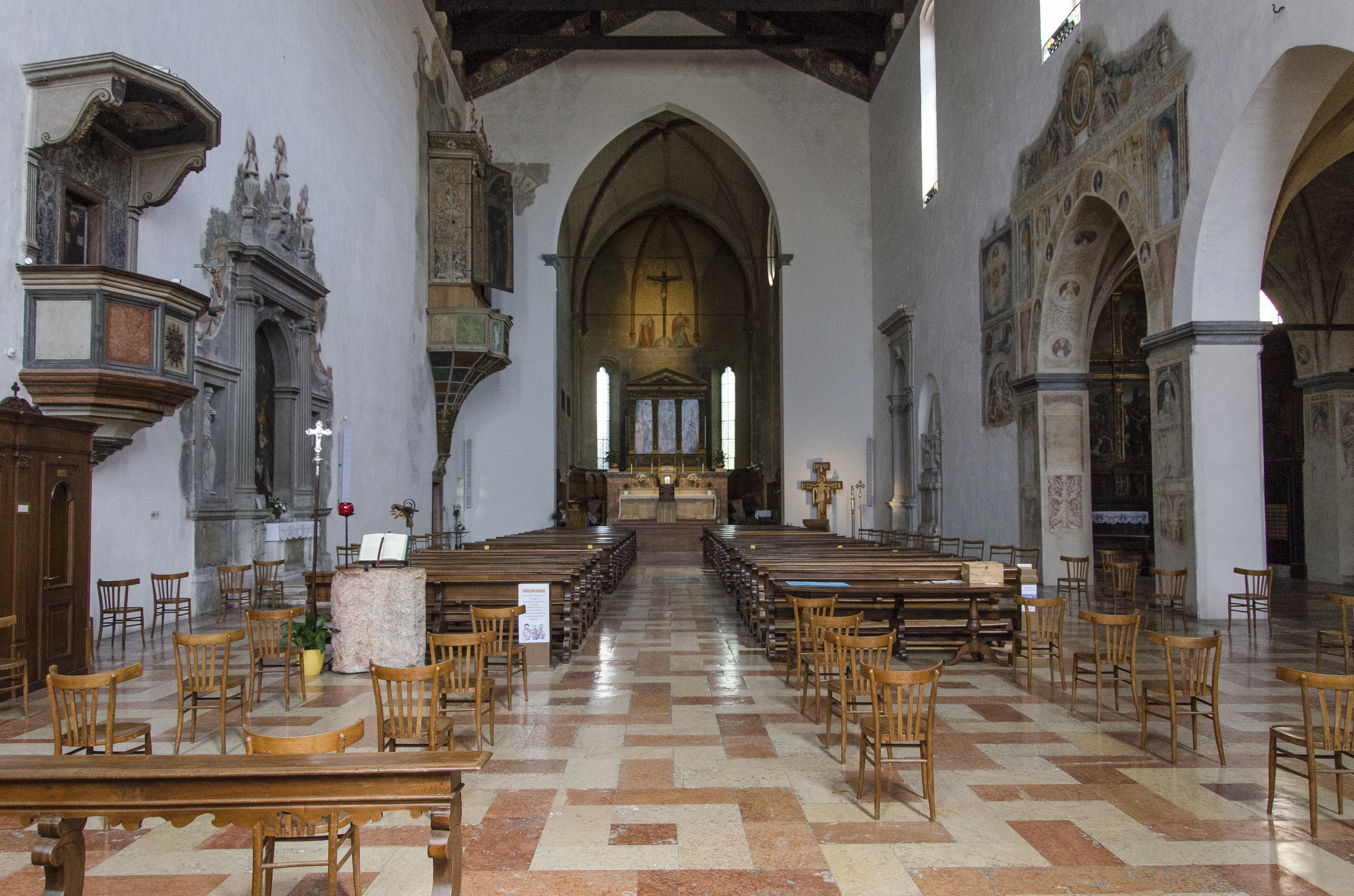 Chiesa di San Bernardino a Verona